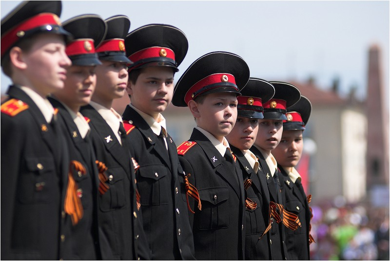 Воспитанники кадетского корпуса на параде в честь Дня Победы, Тольятти, Россия